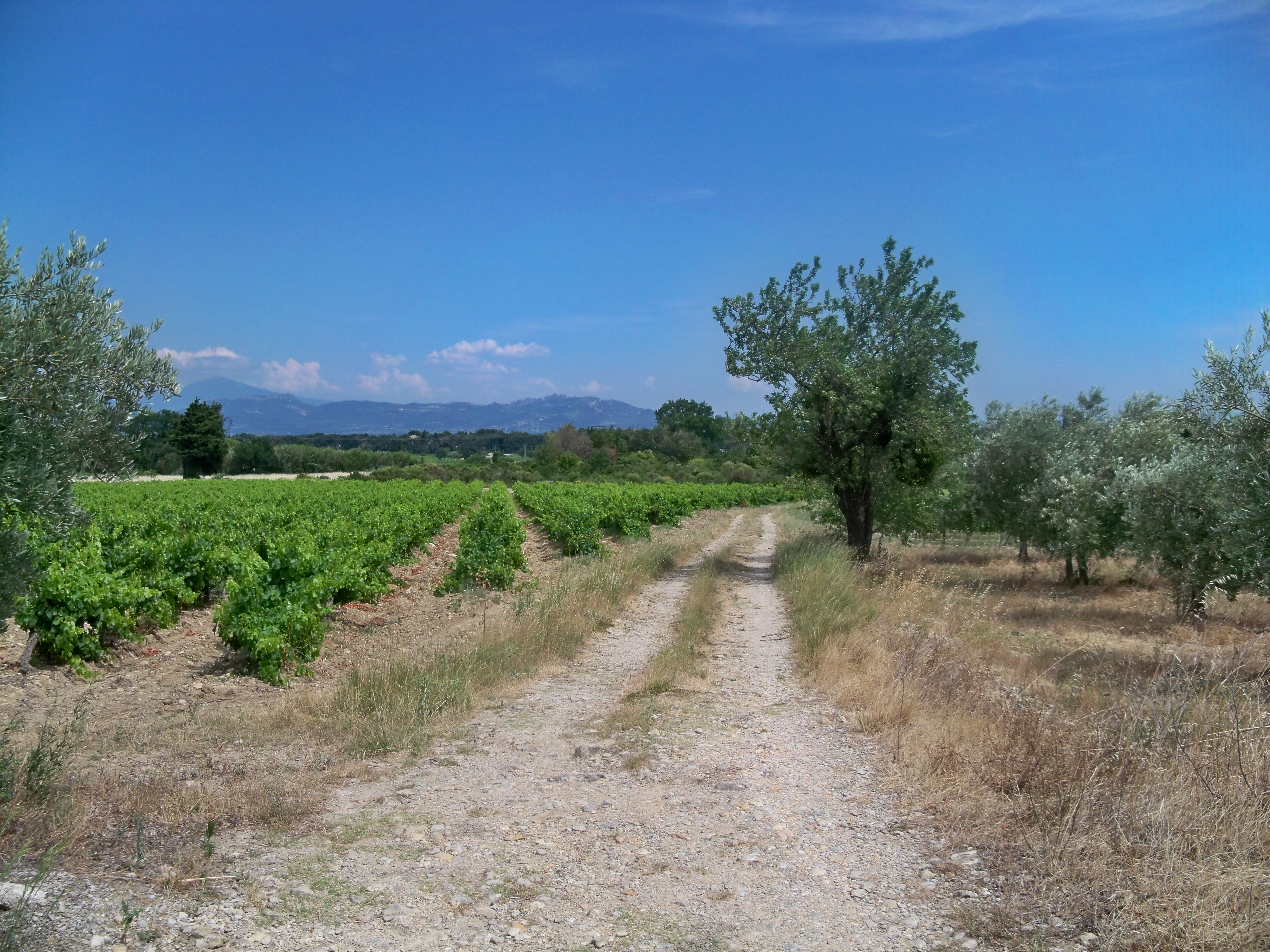 Vignes et Oliviers en Vaucluse